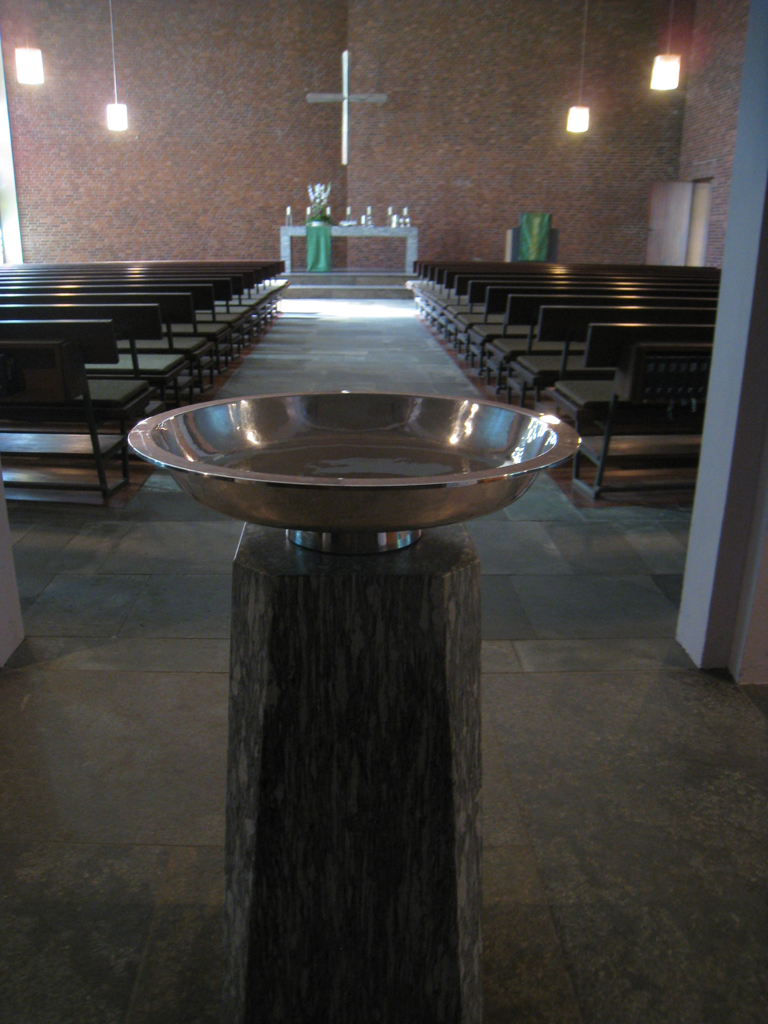 Blick Richtung Westen